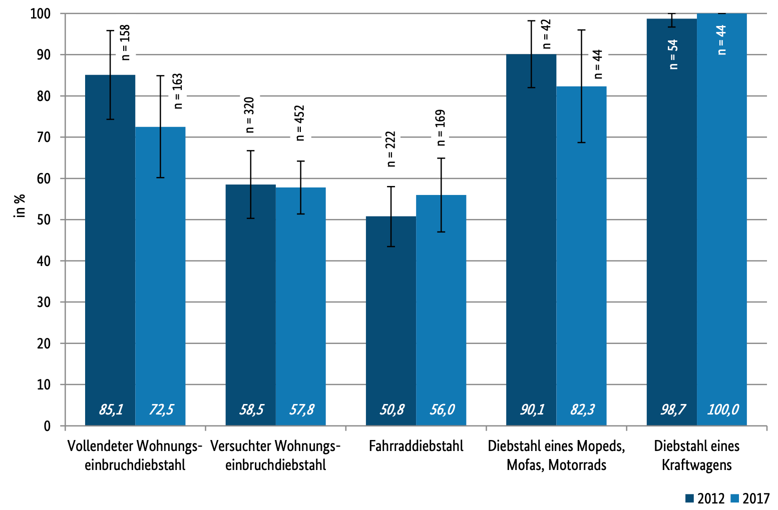 Anzeigequoten für personenbezogene Opfererlebnisse innerhalb der letzten zwölf Monate (2017) in der Bundesrepublik Deutschland